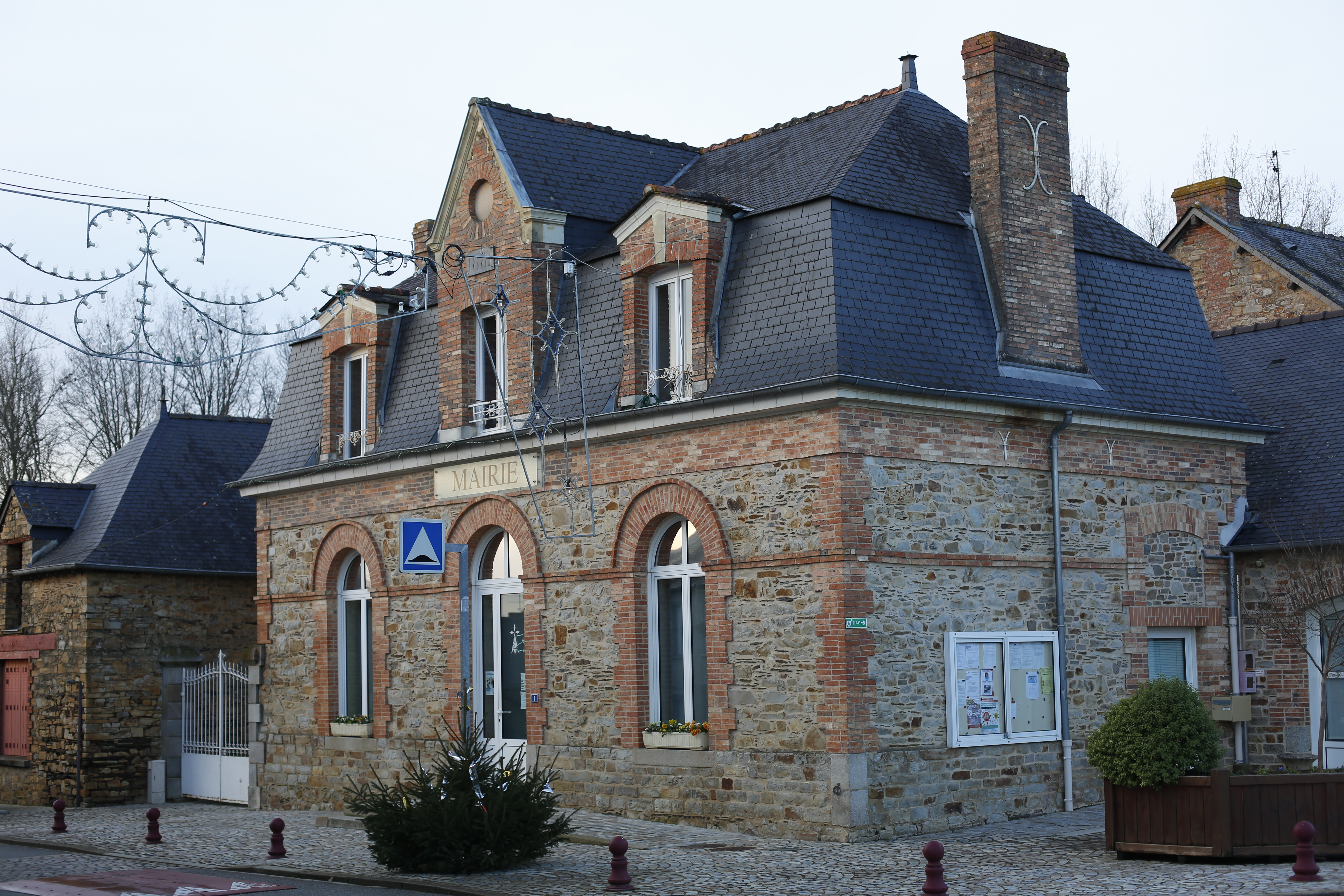 Mairie de Saint-Sulpice-des-Landes.